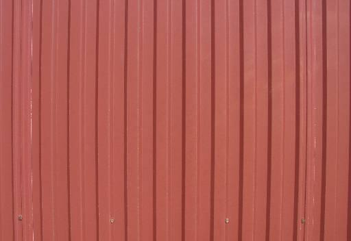 Steel siding